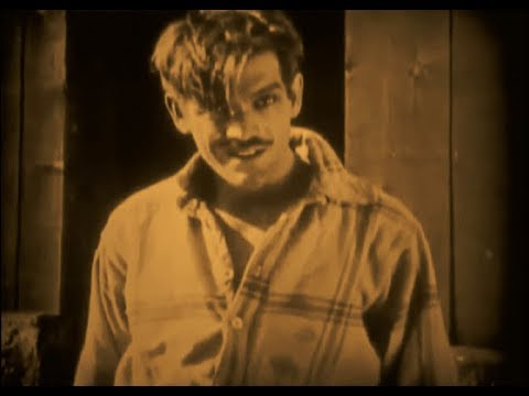 Кадр с Борисом Карлоффом из фильма The Deadlier Sex (1920)